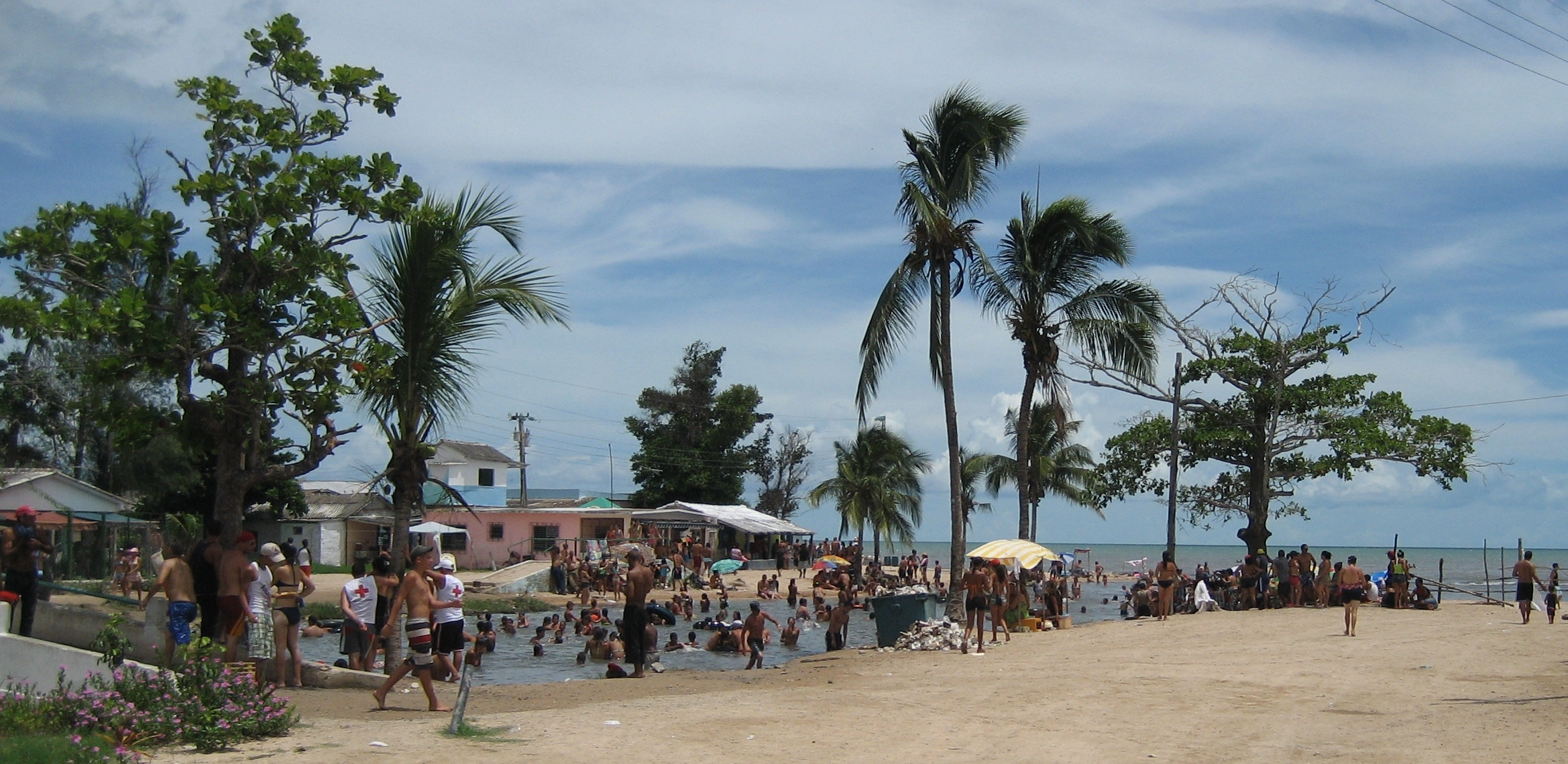 Desembocadura de Rio en Playa Mayaque